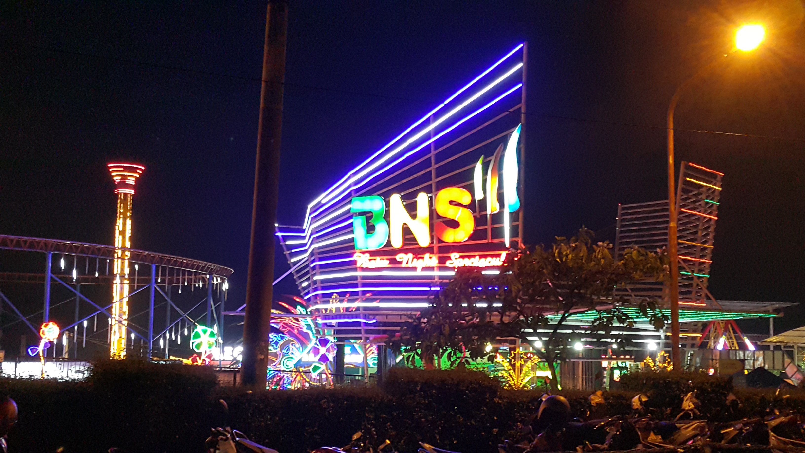 Pintu Utama BNS